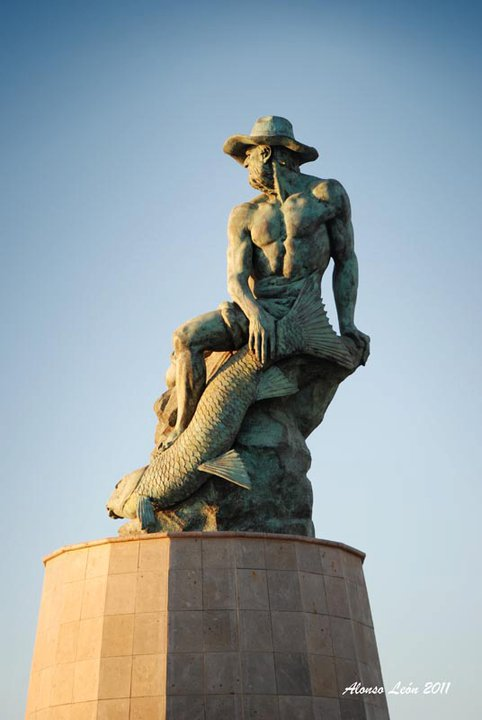 Monumento al pescado, simboliza la actividad principal del puerto de Guaymas, Sonora, México. esta obra tiene una placa donde esta escrita la canción la barca de Guaymas, cantada por varios cantantes Mexicanos como Vicente Fernández.